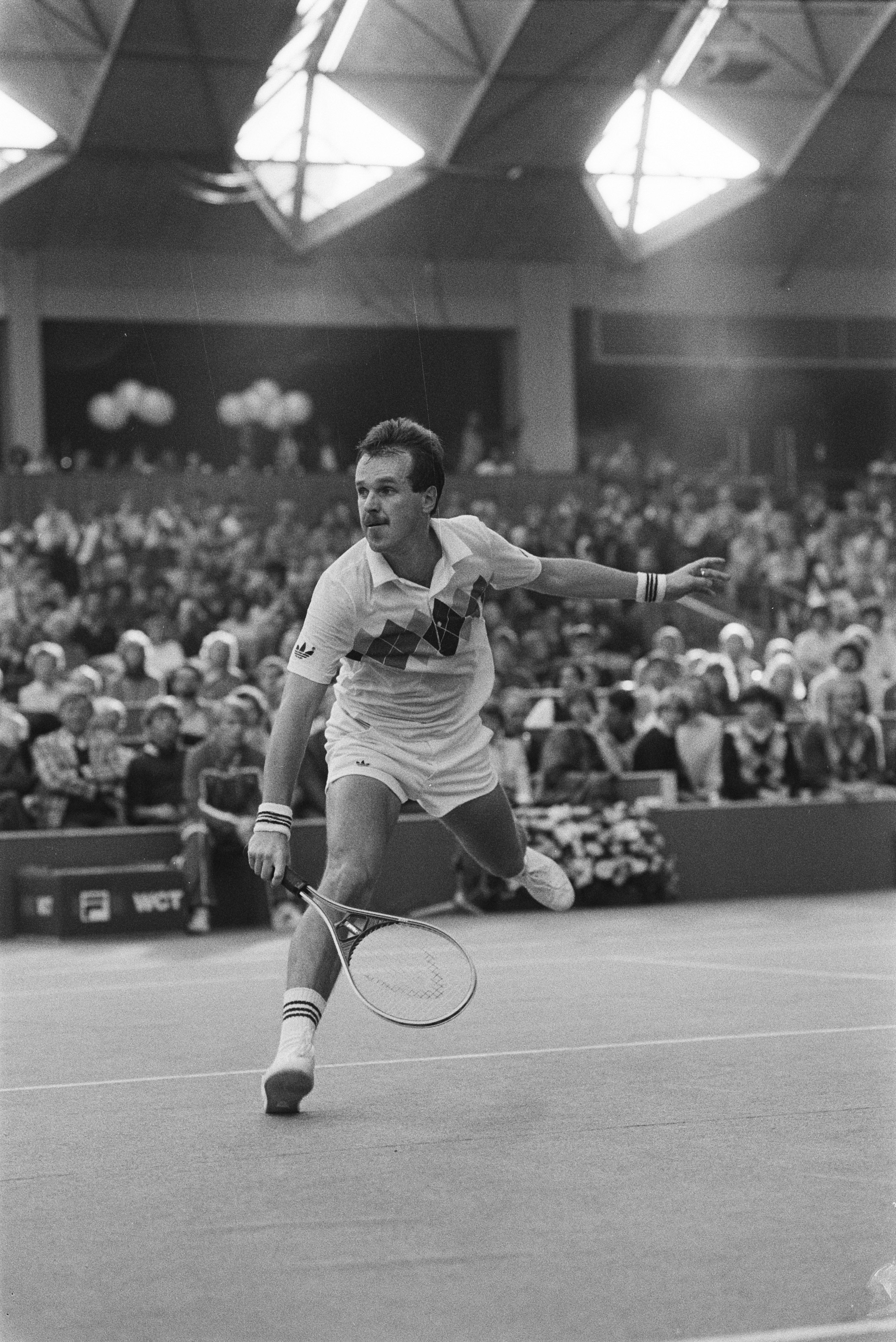 Collectie / Archief : Fotocollectie Anefo Reportage / Serie : Finale van het WCT-tennistoernooi Beschrijving : Winnaar Fibak uit Polen in actie Datum : 27 oktober 1982 Trefwoorden : finales, tennis, winnaars Persoonsnaam : Fibak, Wojtek Fotograaf : Antonisse, Marcel / Anefo Auteursrechthebbende : Nationaal Archief Materiaalsoort : Negatief (zwart/wit) Nummer archiefinventaris : bekijk toegang 2.24.01.05 Bestanddeelnummer : 932-3751